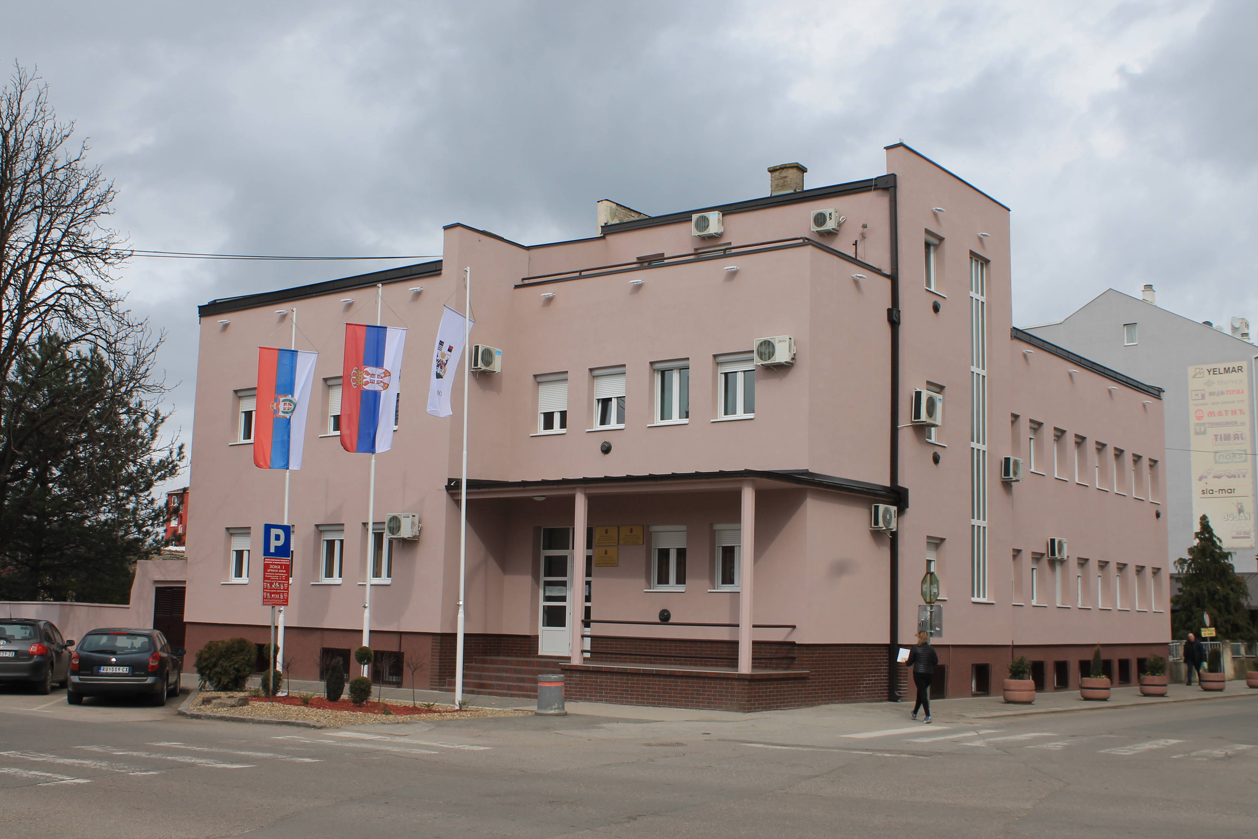 Zgrade, Ruma